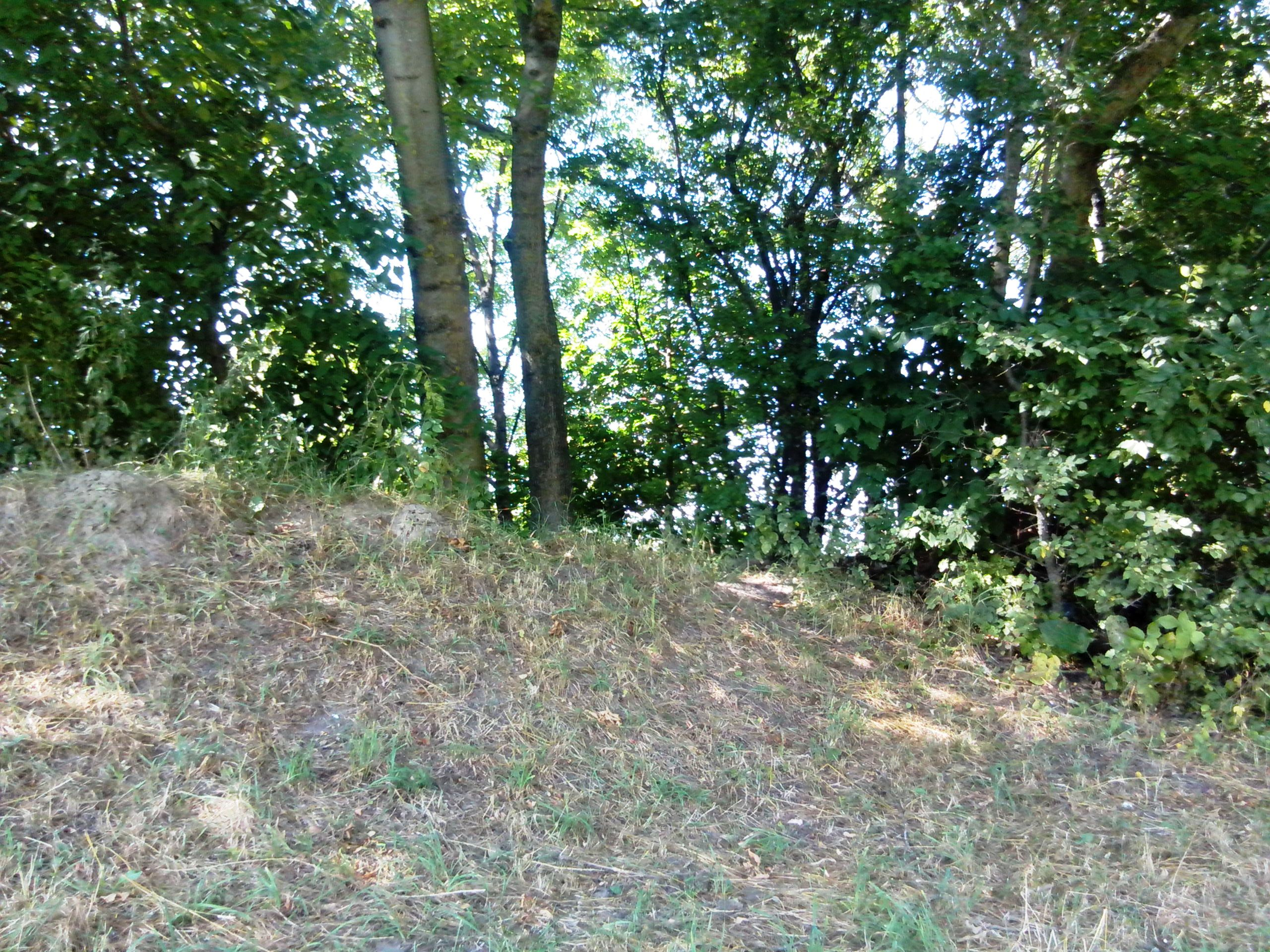 Залишки фортифікаційних валів у с. Гвардійське на шкільному подвір'ї